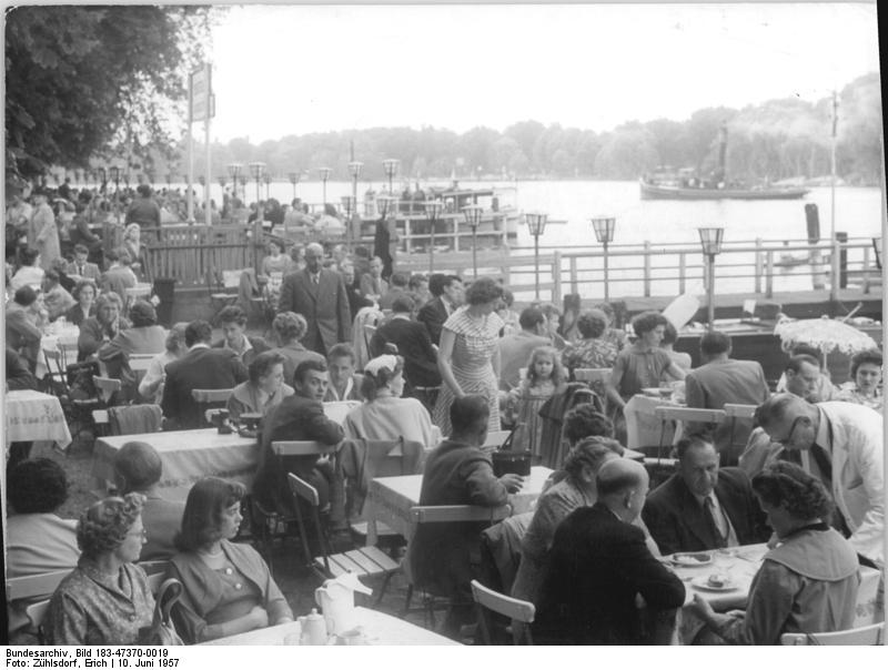 Berlin, Gesellschaftshaus Grünau Zentralbild Zühlsdorf Me 10.6.57 Die Berliner verlebten Pfingsten 1957 im Grünen. Die wanderlustigen Berliner feierten während der Pfingstfeiertage frohes Wiedersehen bei Mutter Grün. Mit Fahrrad, zu Fuß oder mit dem Motorrad waren viele Berliner Familien nach allen Himmelsrichtungen unterwegs. UBz: Hochbetrieb im Gesellschaftshaus Grünau.